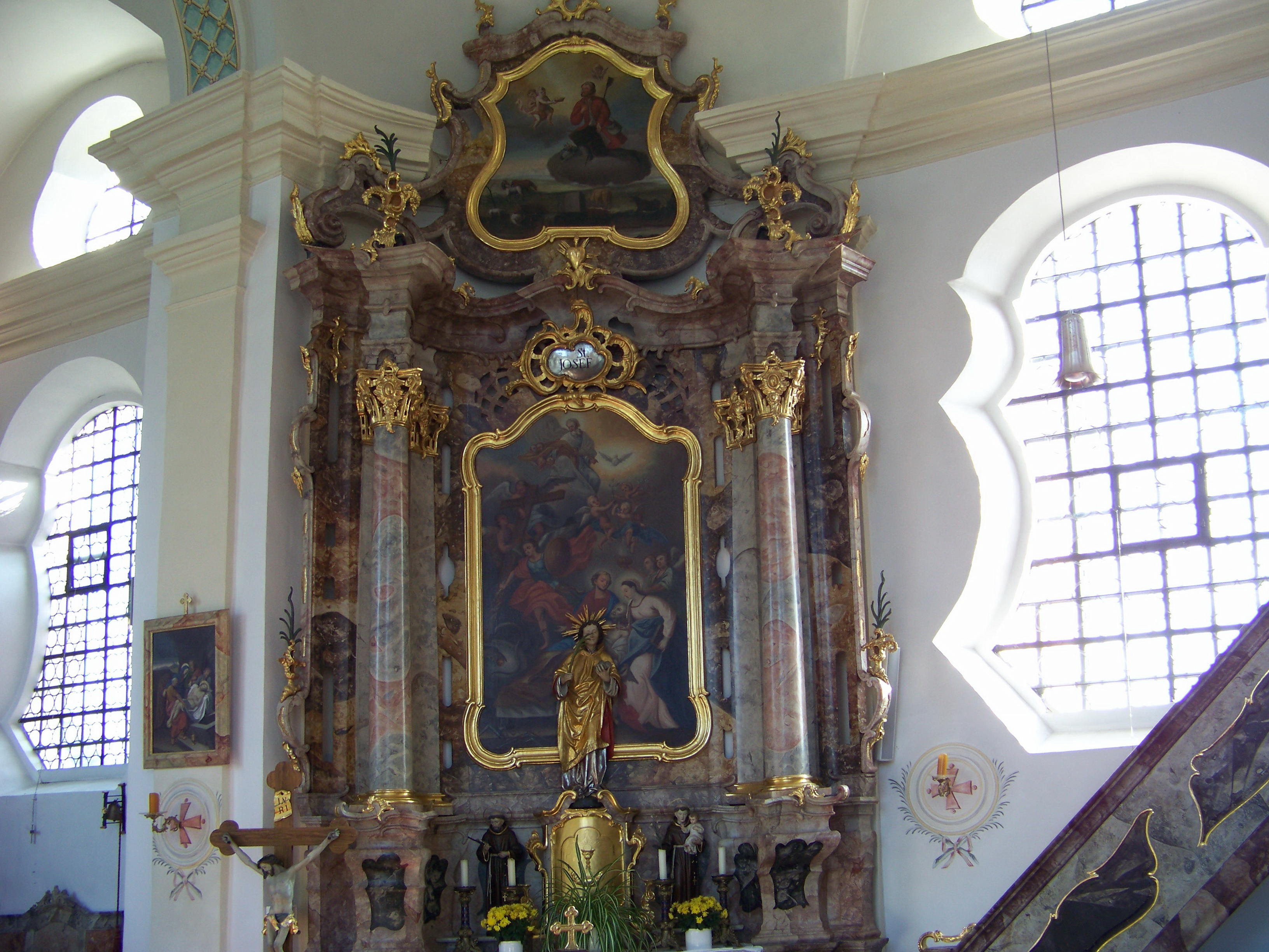 Neufahrn in Niederbayern. Hofendorf 28. Filialkirche St. Andreas. Saalkirche mit eingezogenem Chor und Westturm, Gliederung durch Lisenen und Putzbänder, Westturm mit Geschossgliederung, Achteckaufsatz und Zwiebelkuppel, 1747 von Johann Georg Hirschstötter; mit Ausstattung. Der rechte Seitenaltar ist St. Josef geweiht.